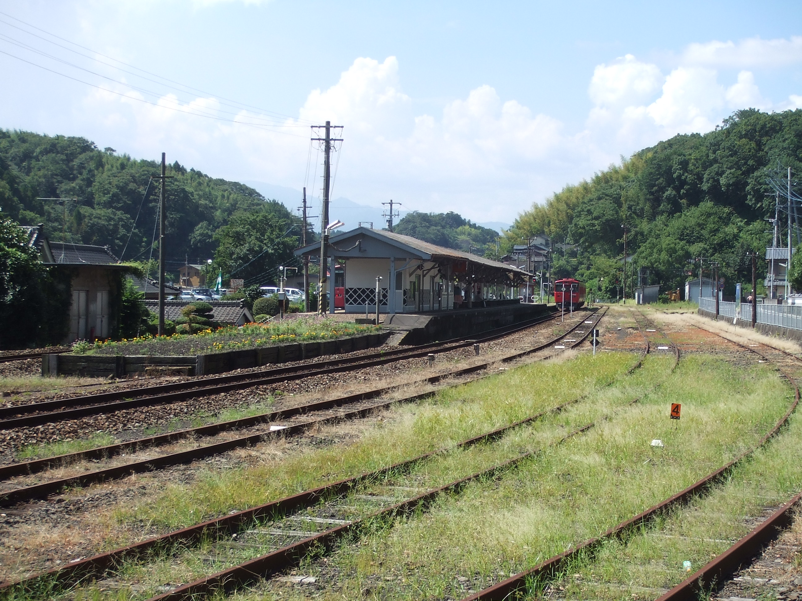 豊後竹田駅 駅構内